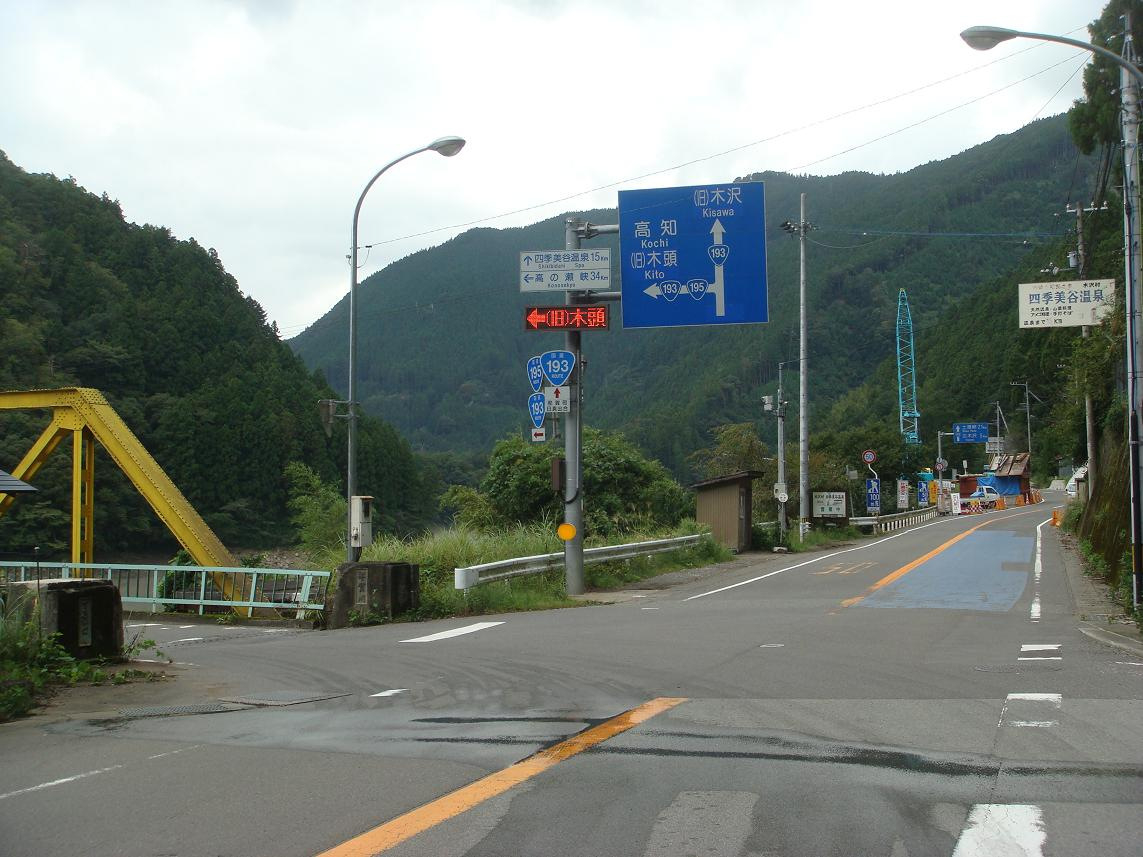 国道193号と国道195号の交点。出合橋北詰。（徳島県那賀郡那賀町日真字出合）